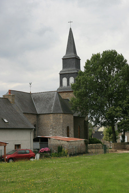 église de Vildé Guingalan